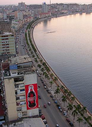 CIDADE DE LUANDA (NOVA MARGINAL) This is an image of music and dance from Angola